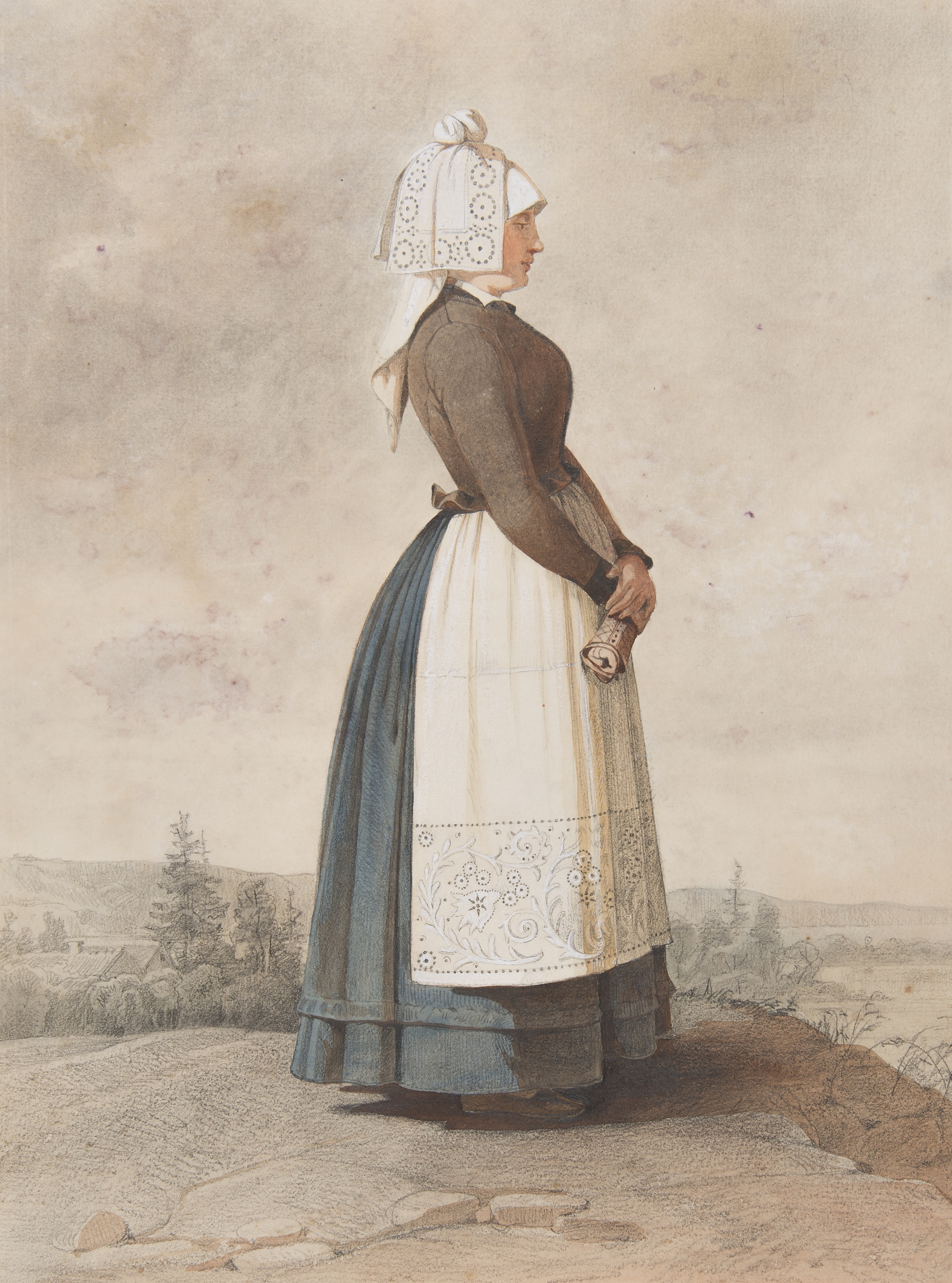 Dräkt. Kvinna stående i helfigur med vitt förkläde. Akvarell i storformat av O. Wallgren Depicted place: Q3591215 (Q3591215) (Härad), Sweden (Q34) (Land), Scania (Q180756) (Landskap)